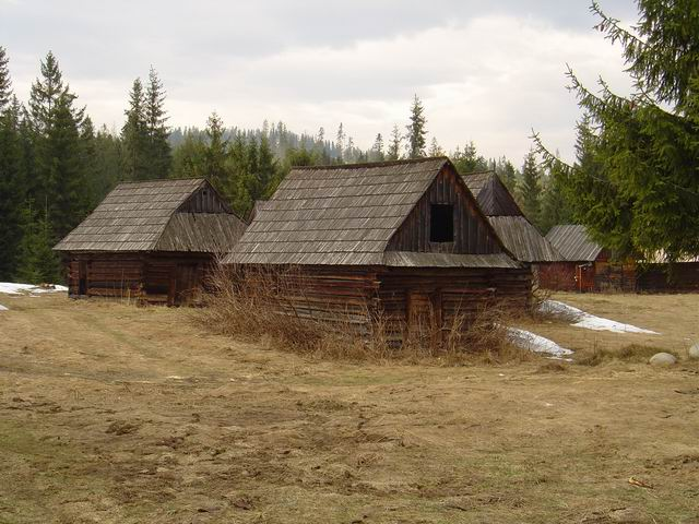 Jurgovské stodoly. Odfotil 09.04.2005 Kristián Slimák. Kategória:Obrázky budov Kategória:Presunúť na Commons